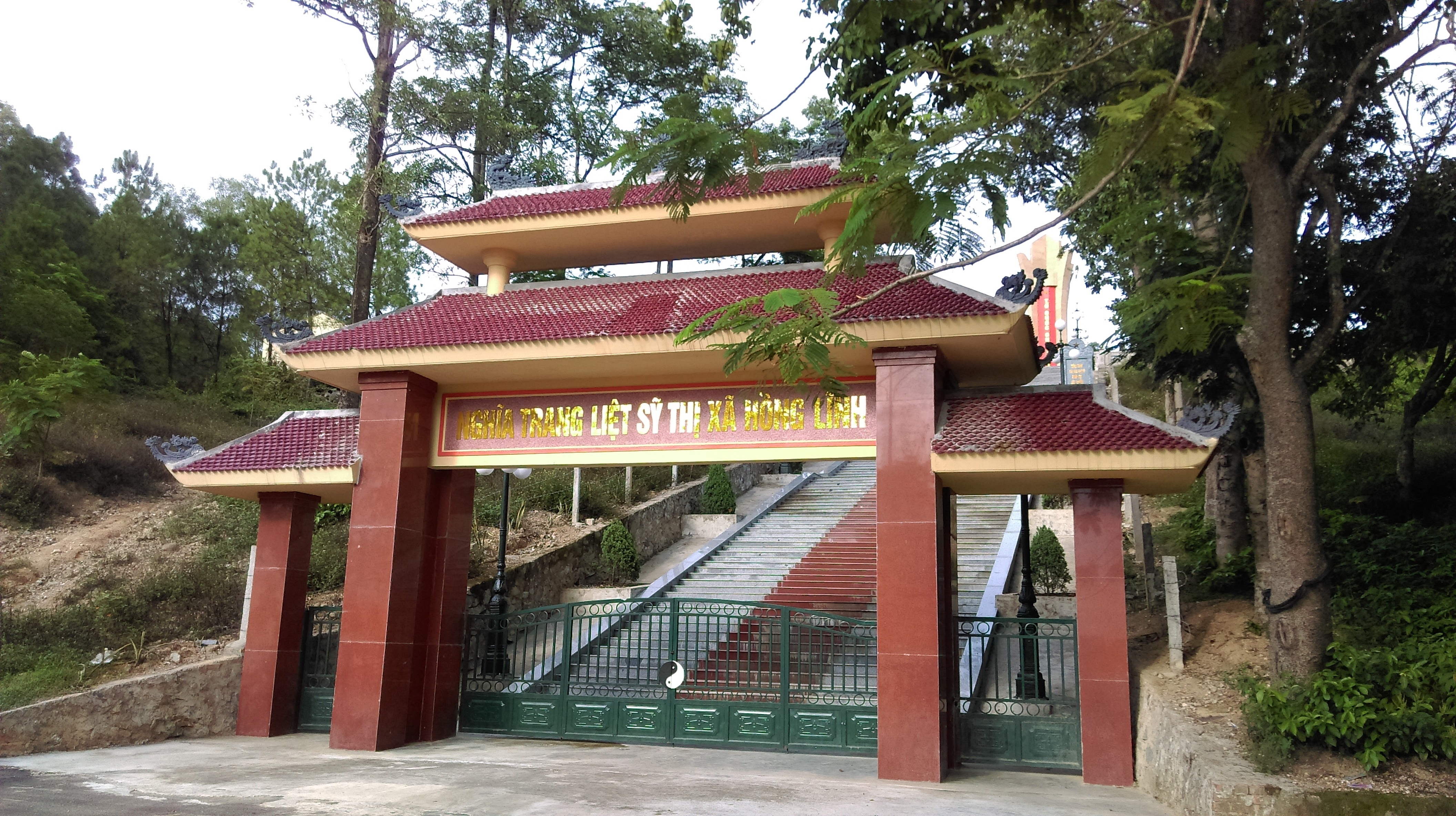 Nghĩa trang Liệt sĩ Hồng Lĩnh, Hà Tĩnh